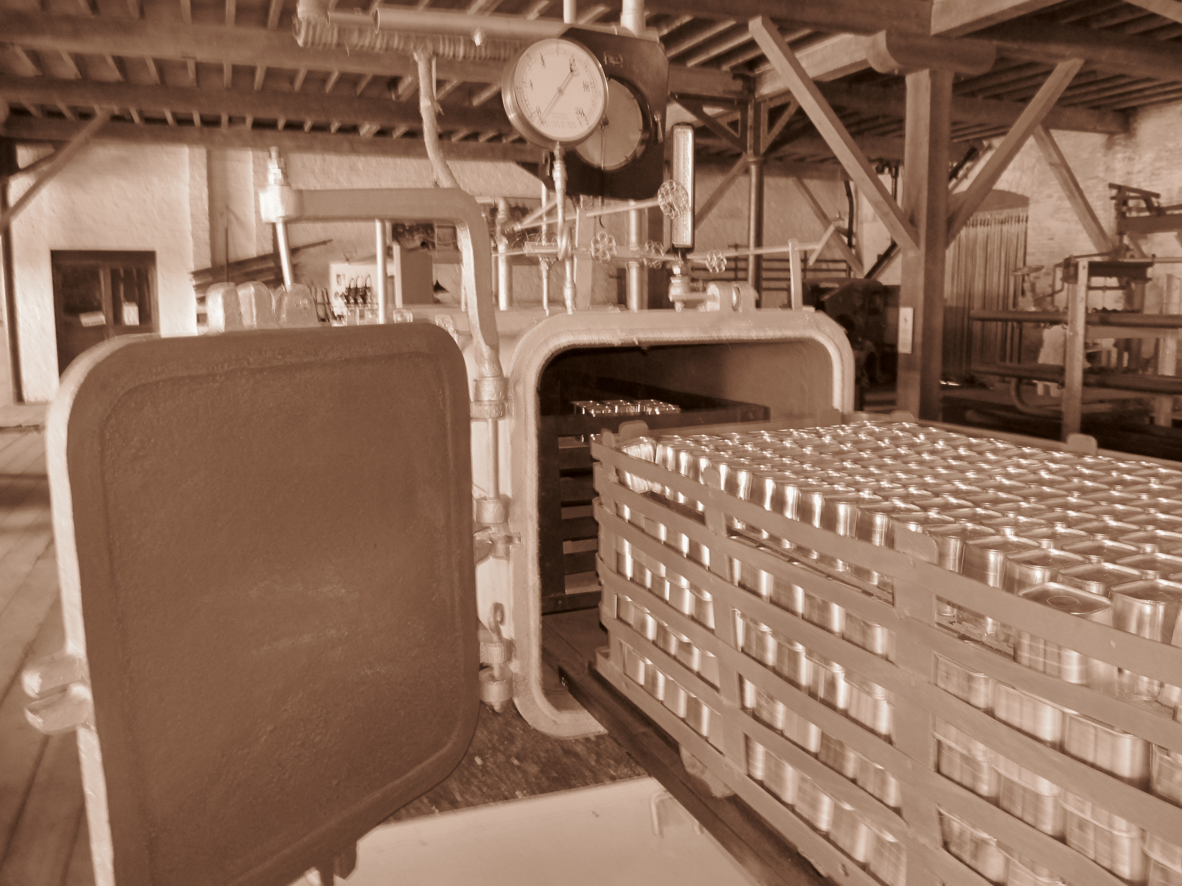 Complejo Industrial Anglo (instalación fabril y puerto) Barrio Anglo, La Pandilla, Zona del Golf, Camino de Tropa, Corrales, Zona de las Romerías Basurero Histórico, Zonas naturales: barrancas y espacios verdes. Ubicada en el departamento de Río Negro